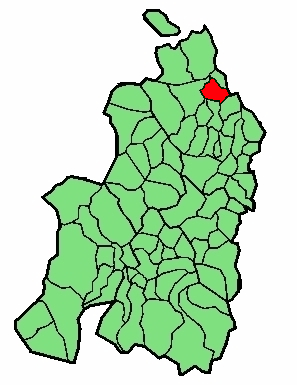 aipaturiko udalerriaren kokapena Nafarroa Beherean